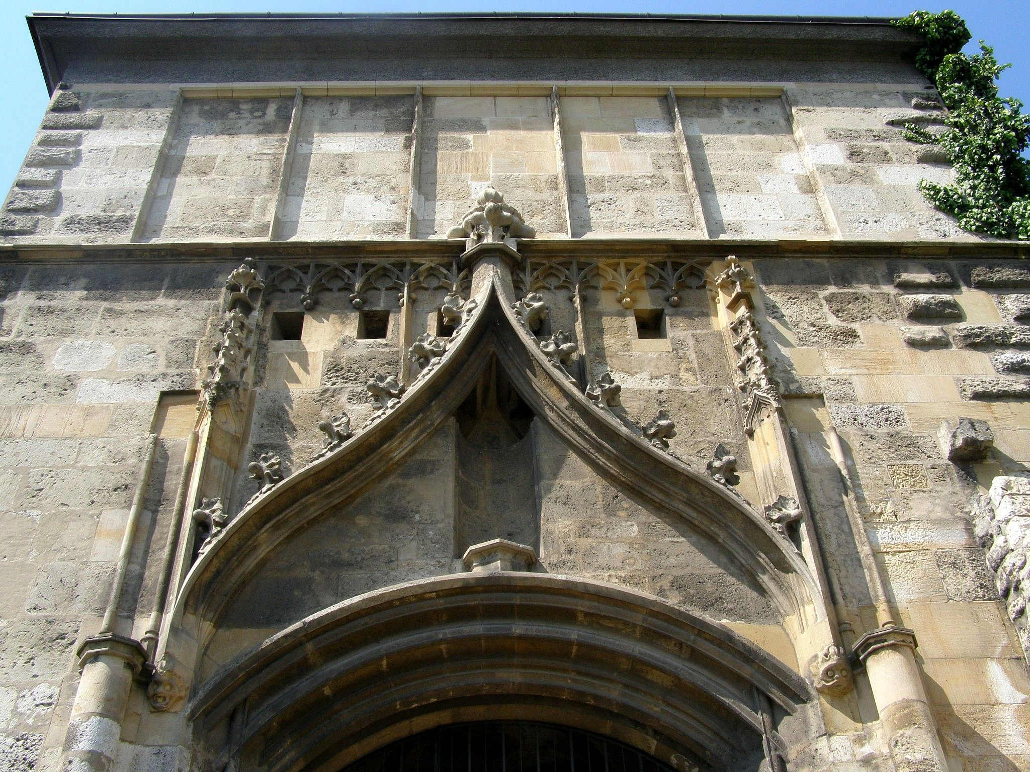 Detail gotickej výzdoby nad východným portálom Žigmundovej brány